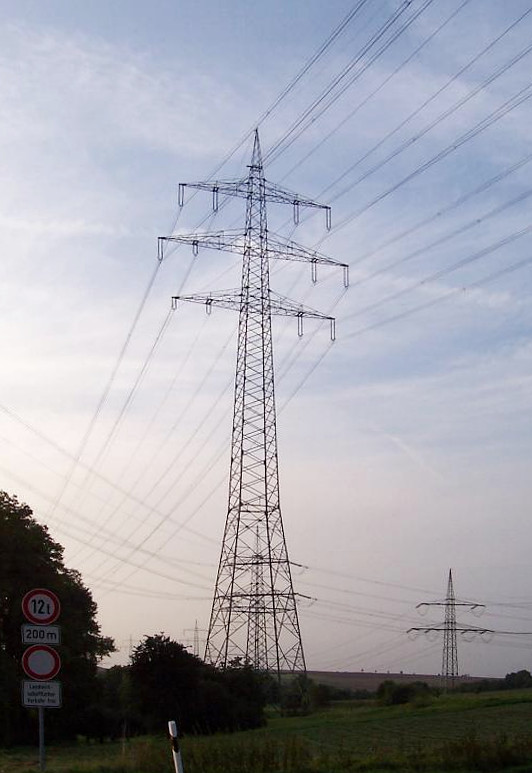 Freileitungsmast („Freiberger Riese“, 108,5 m hoch) in Freiberg am Neckar; Kreuzung der 380-kV-Leitung Bürstadt–Hoheneck (Bl. 4524), die darunter verläuft (quer durchs Bild)